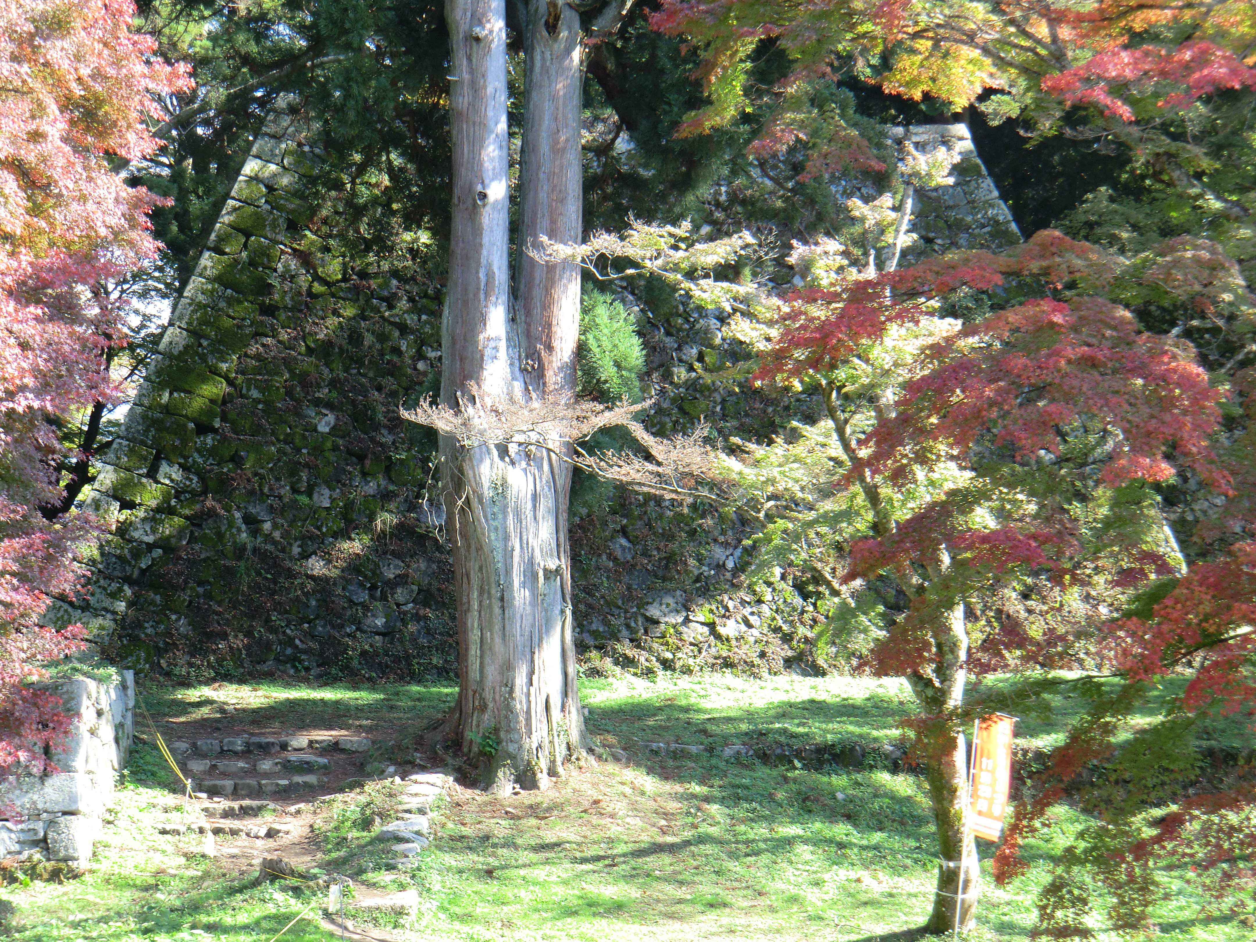 高取城、天守台石垣の西面